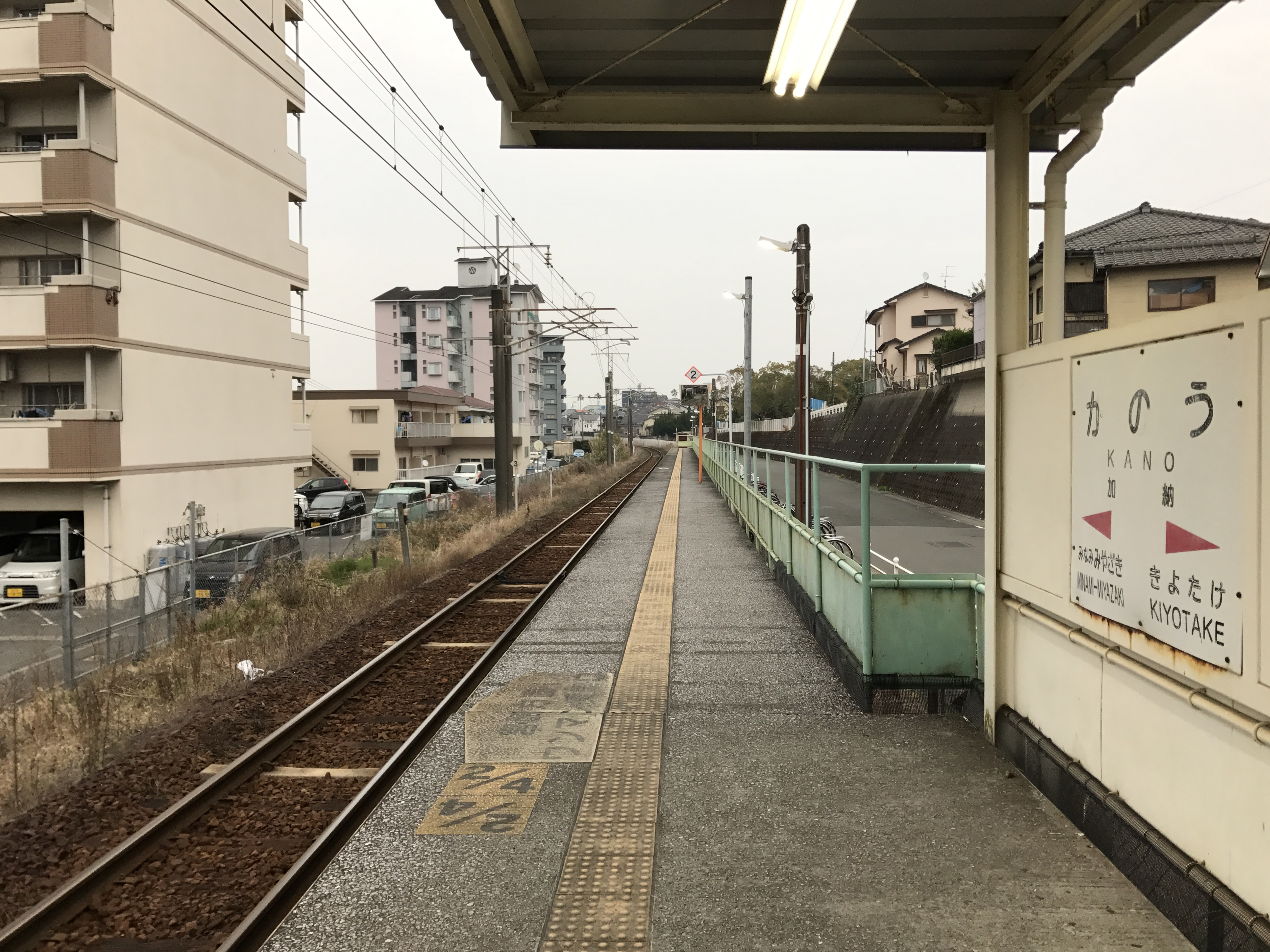 加納駅(宮崎県)のホーム(奥は南宮崎方面)